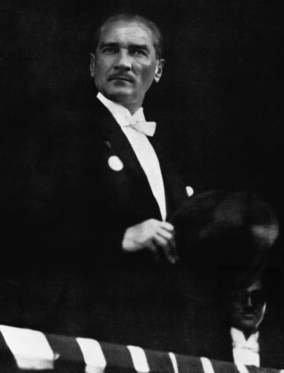 Reisicumhur Mustafa Kemal (Atatürk) Cumhuriyet Bayramı kutlamalarında, Ankara, 29 Ekim 1925